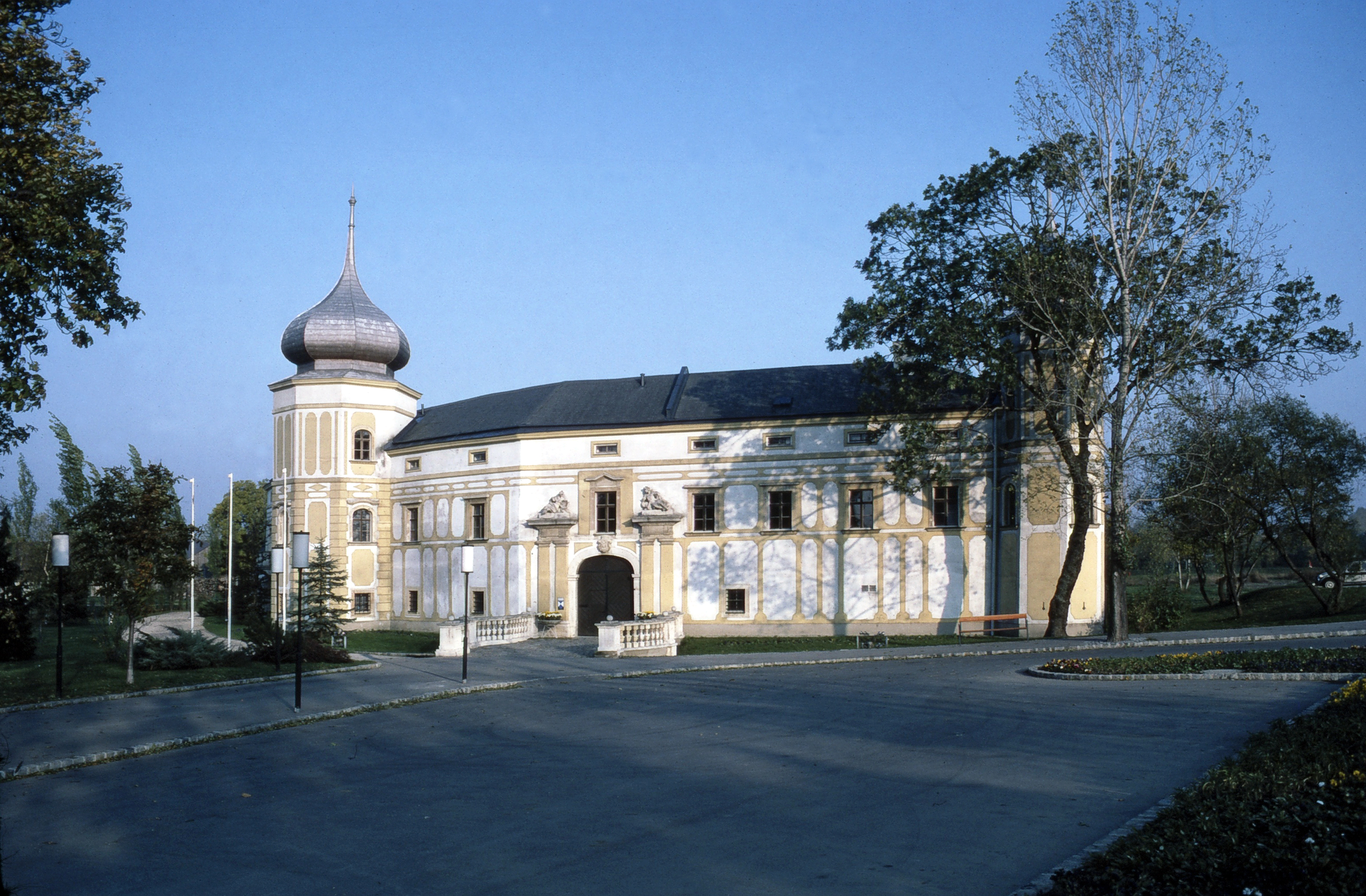 Frontansicht Schloss Rothmühle gemäß Renovierung 1972